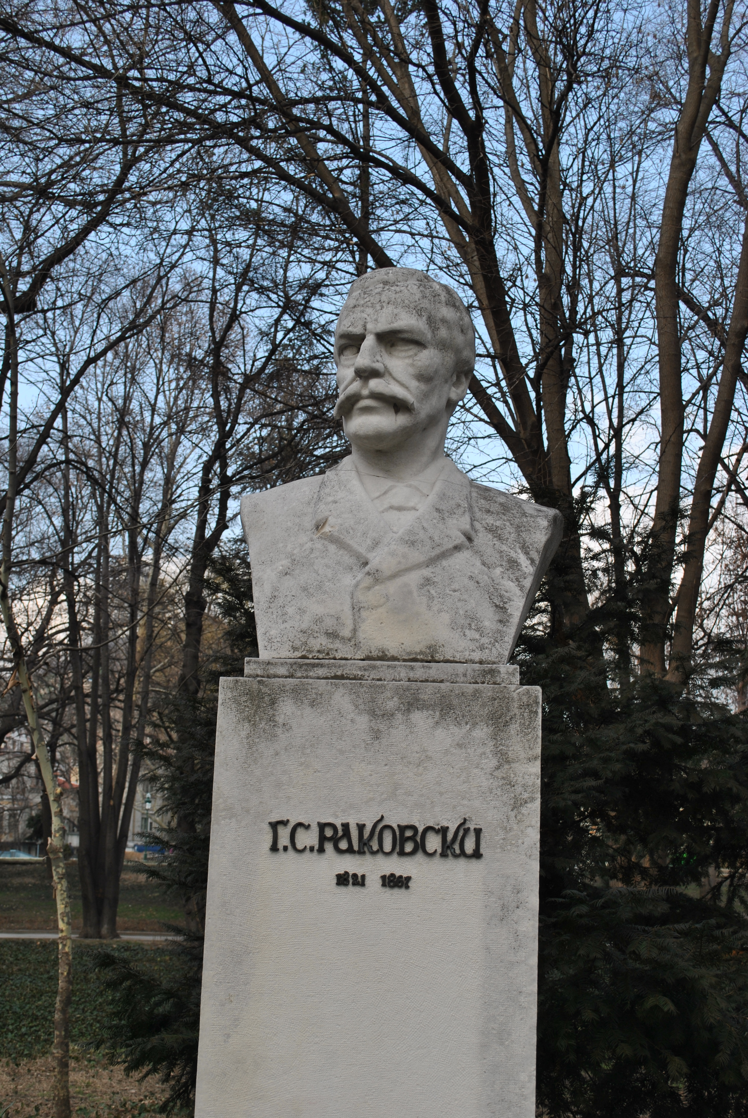 Паметник на Георги Сава Раковски в Цар Симеоновата Градина, Пловдив, България